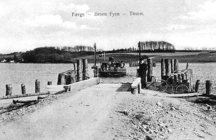 Thurøfærgen vor dem elektrischen Betrieb ab 1908